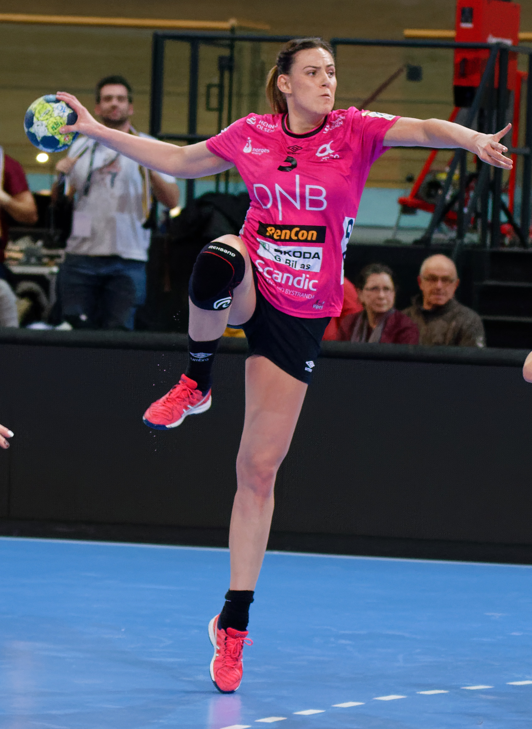 Rencontre du tour principal de coupe EHF entre Issy Paris Hand et les norvégiennes de Vipers Kristiansand au vélodrome de Saint-Quentin en Yvelines, le 03 février 2018.